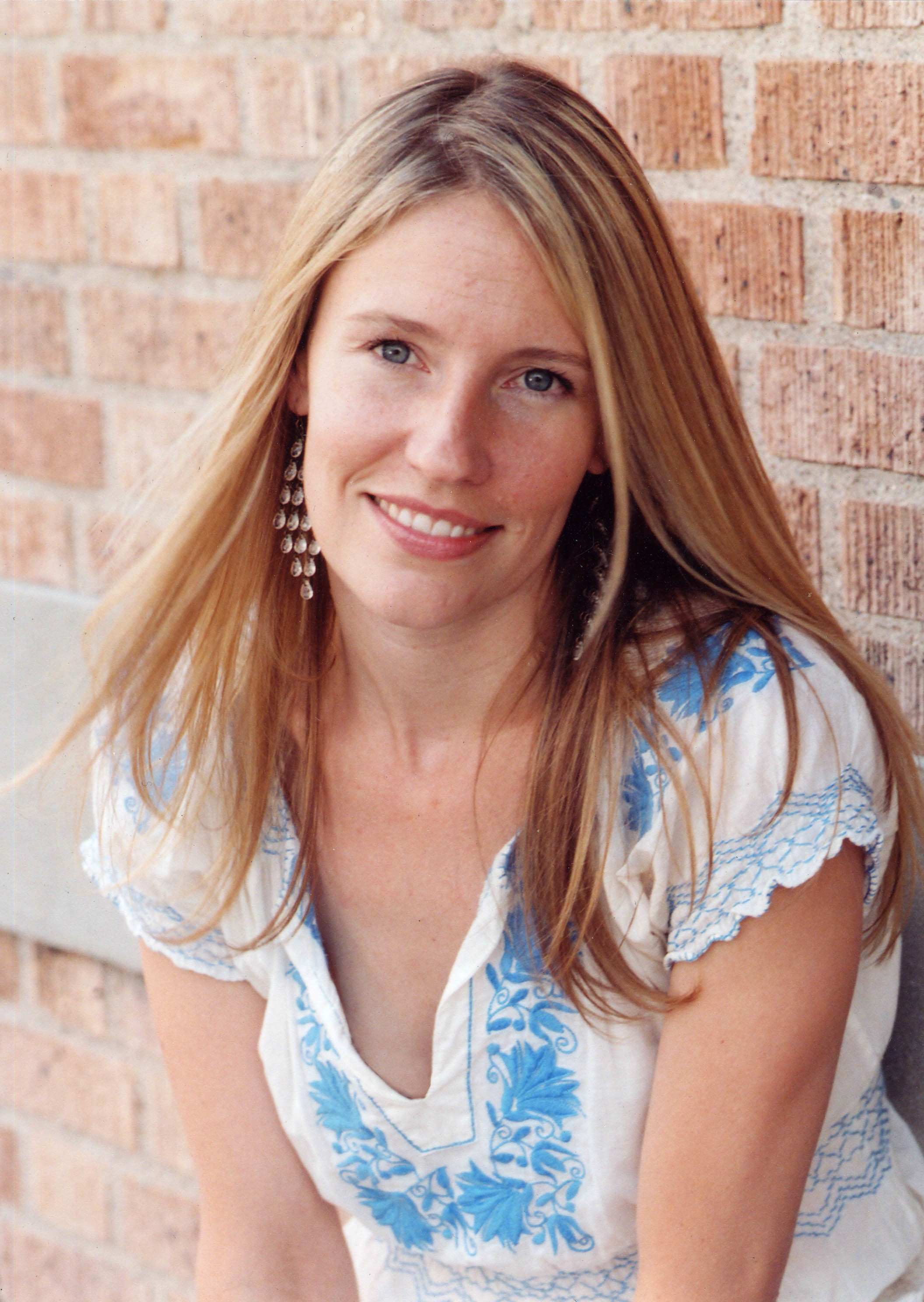 portret Jennifer Baumgardner